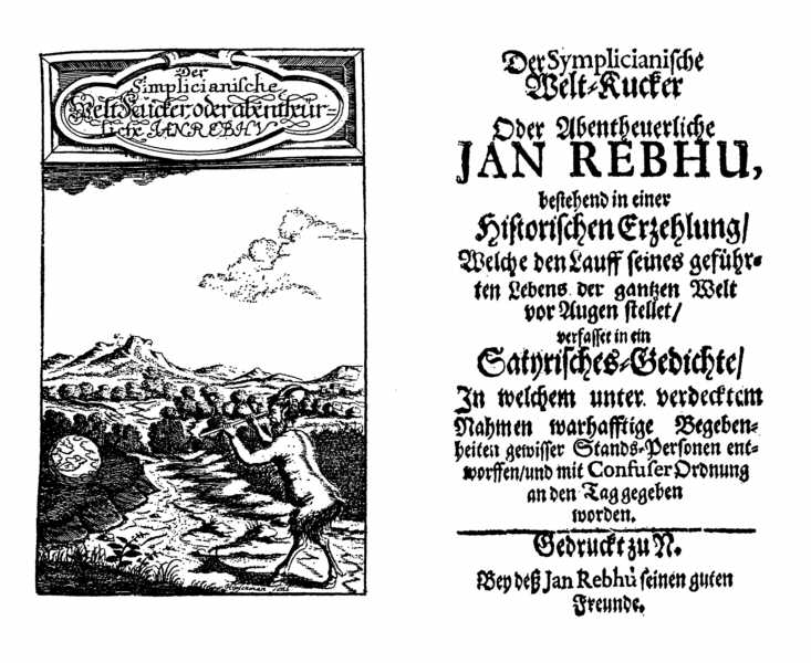 Titel des Romans "Der Simlicianische Welt-Kucker" von Johann Beer, 1677